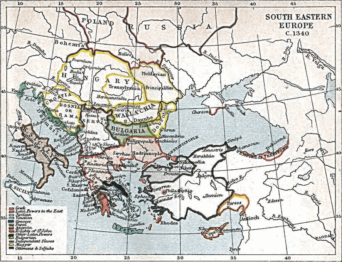 L'Europe du sud-est et l'Anatolie en 1340